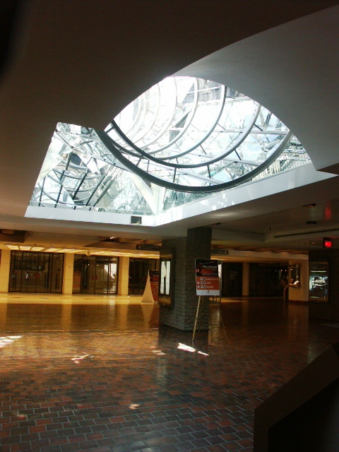 Light well in Place des Arts, in Montreal - an artwork entitled L'artiste est celui qui fait voir l'autre côté des choses by Claude Bettinger. Photo by: User:Gene.arboit